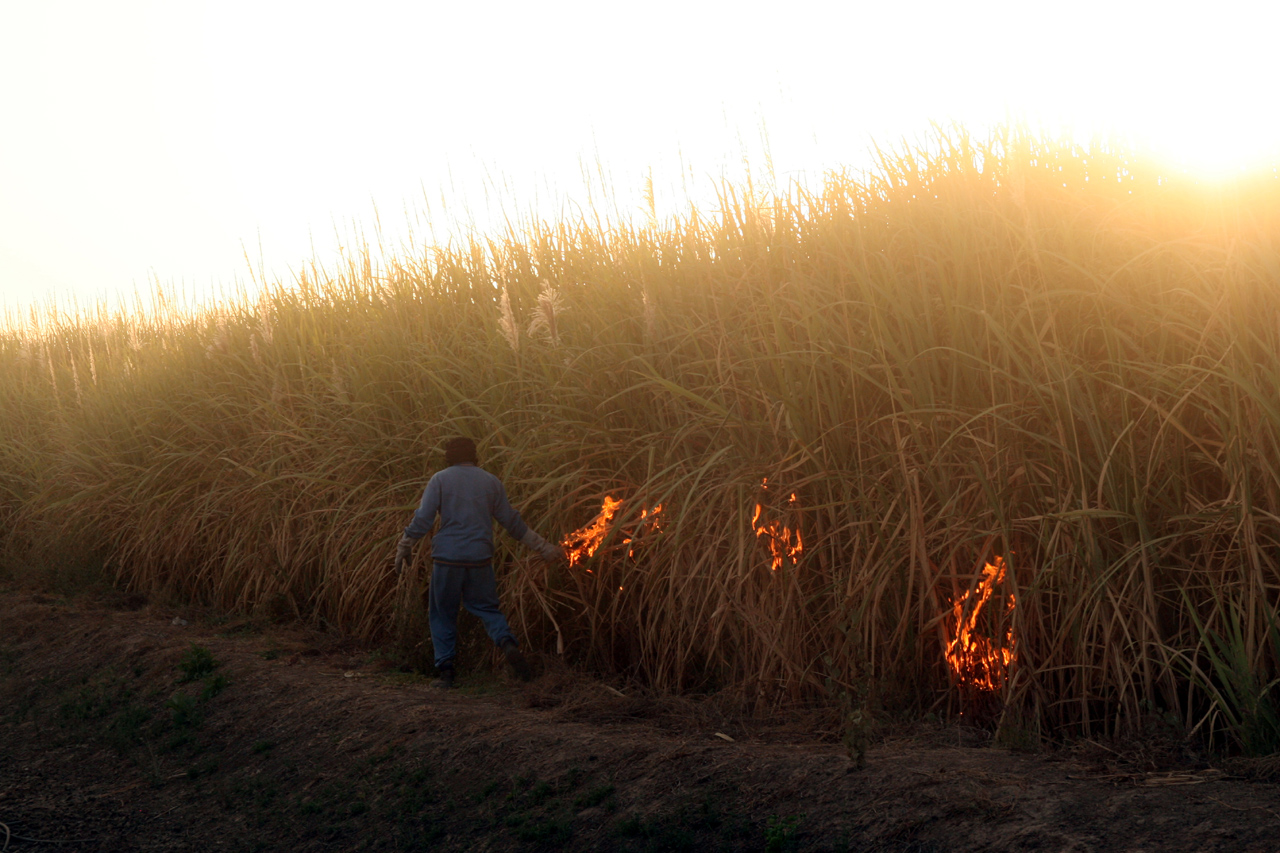 Compagnie sucrière du Sénégal, brulage des champs de canne à sucre